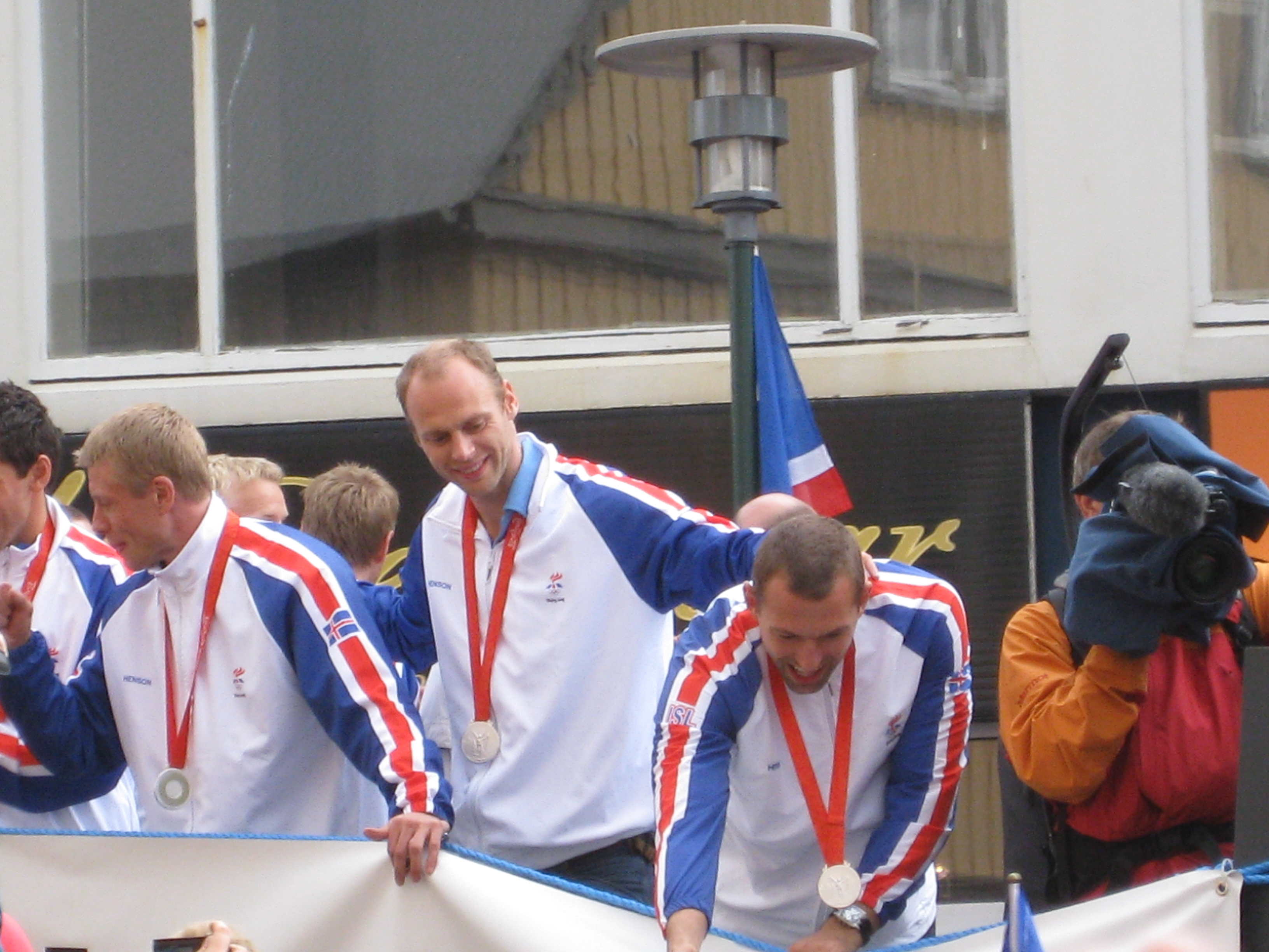 Landsliðsmennirnir Guðjón Valur Sigurðsson, Ólafur Stefánsson og Sverre Andreas Jakobsson í skrúðgöngu á leið niður Bankastræti